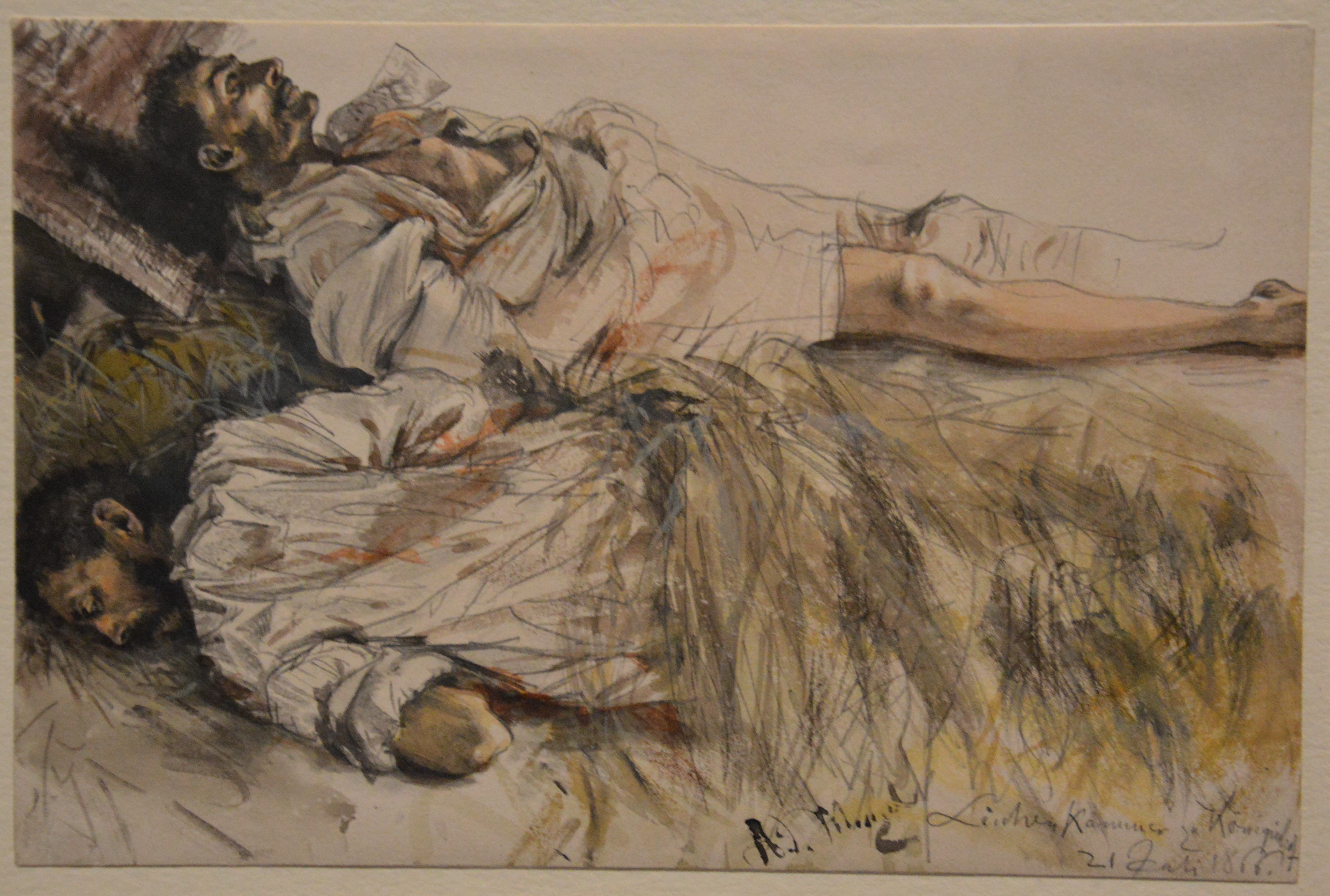 Adolph Menzel - Leichen-Kammer zu Koninginhof - Zwei gefallene Soldaten in einer Scheune (21 July 1866)